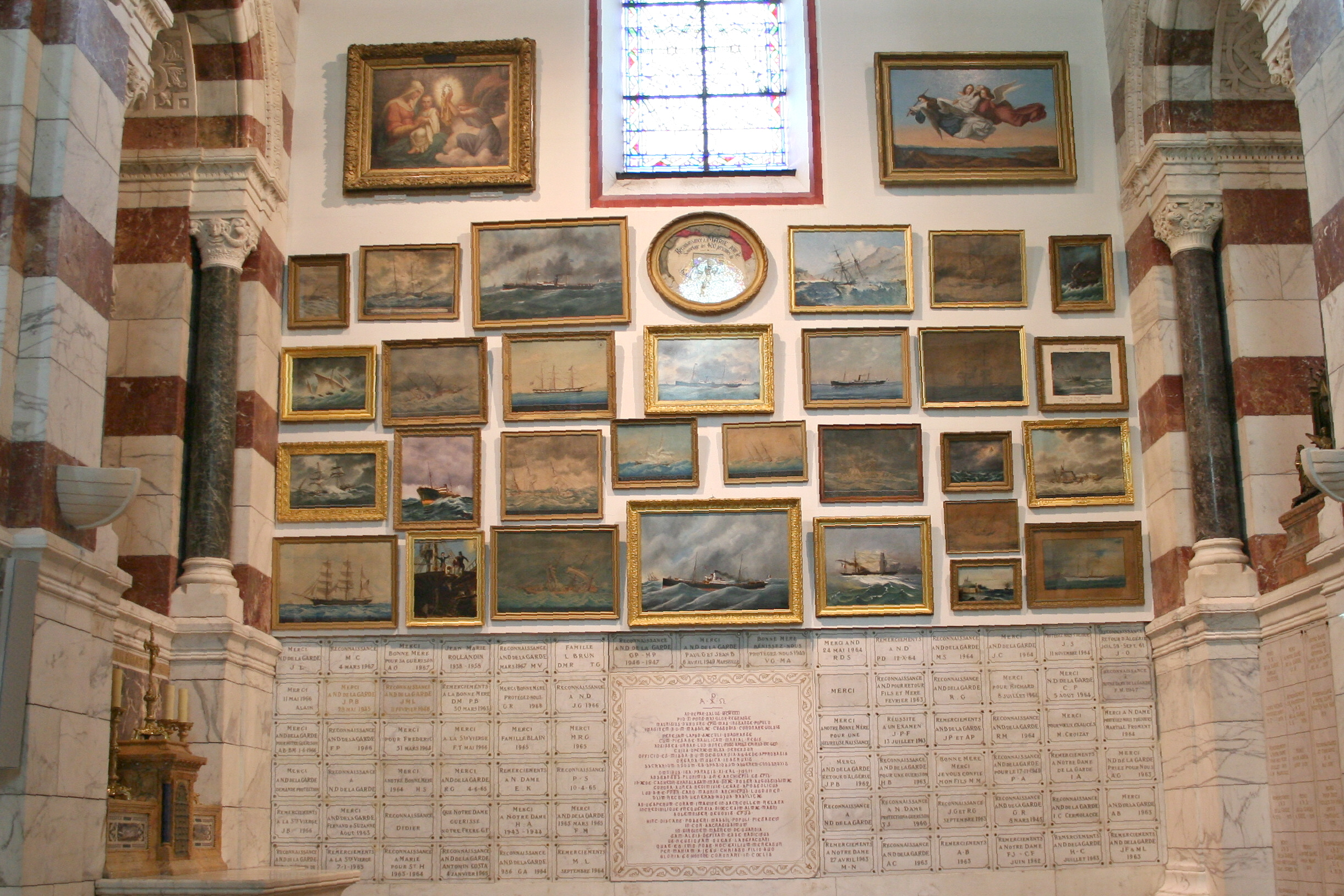 Ex-voto dans la basilique Notre-Dame de la Garde à Marseille.